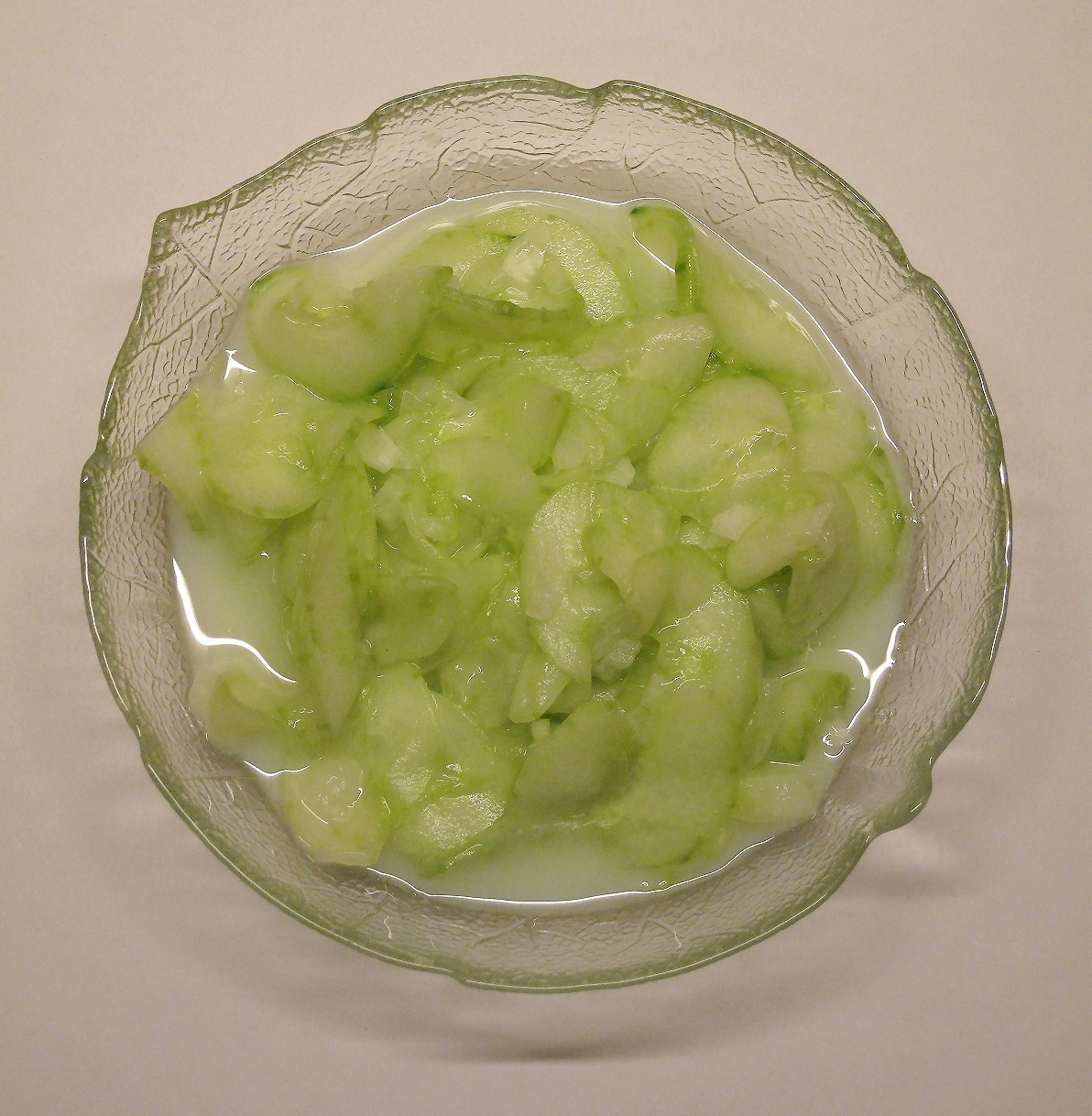 Gurkensalat